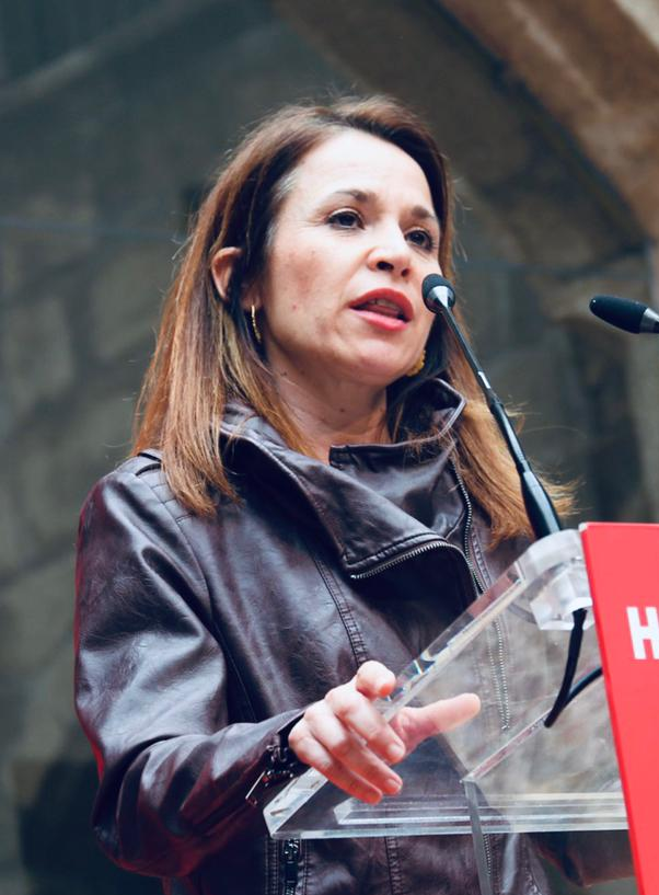 Acto Igualdad en Cáceres